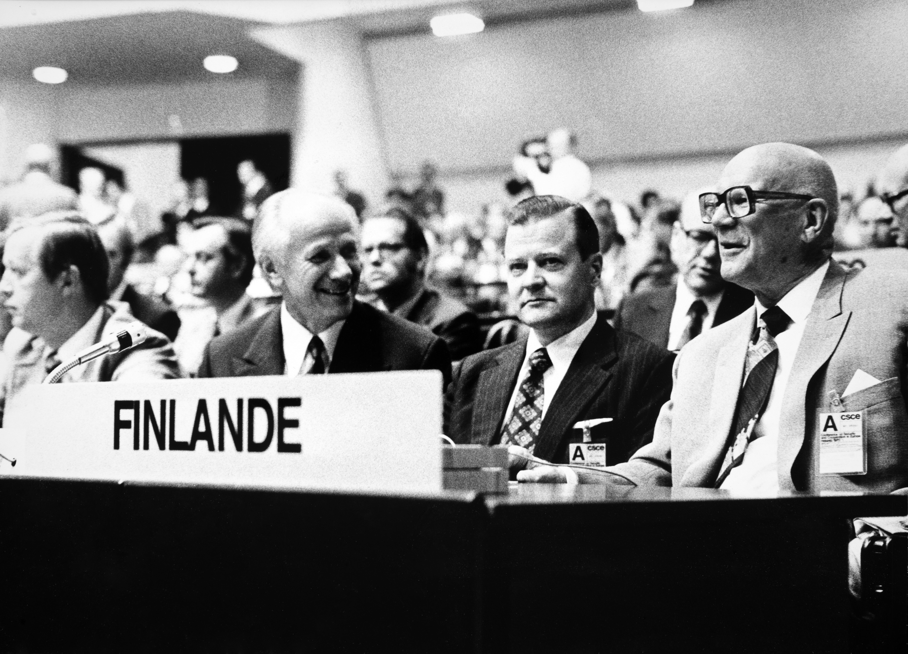 Euroopan turvallisuus- ja yhteistyökokous ETYK Helsingissä 30.7.–1.8.1975: Suomen valtuuskunnan jäseniä kokoussalissa eturivissä vas. SDP:n puheenjohtaja Kalevi Sorsa, ulkoministeri Olavi J. Mattila, pääministeri Keijo Liinamaa, presidentti Urho Kekkonen.